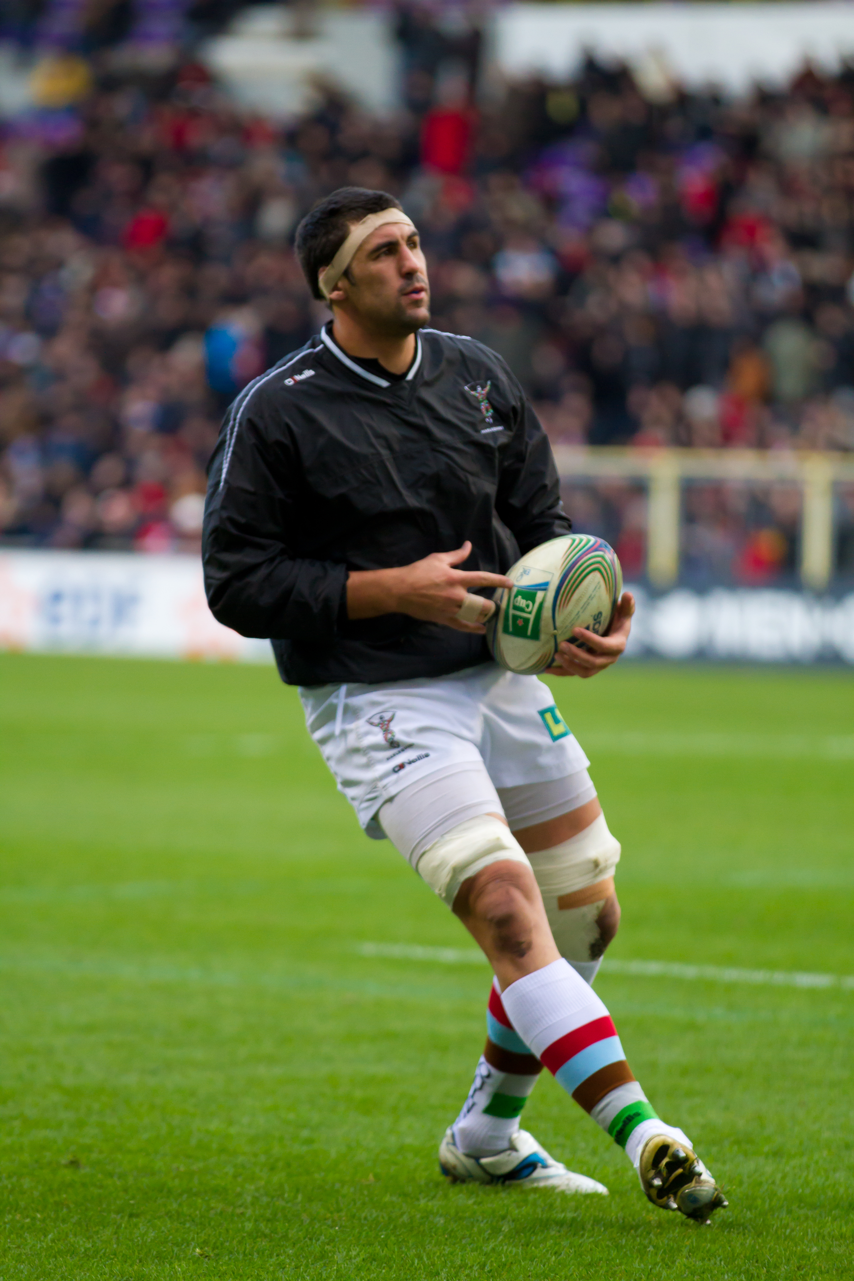 Heineken Cup 2011-2012 — 18 December 2011, Stadium. Match between: Stade toulousain — Harlequin F.C.